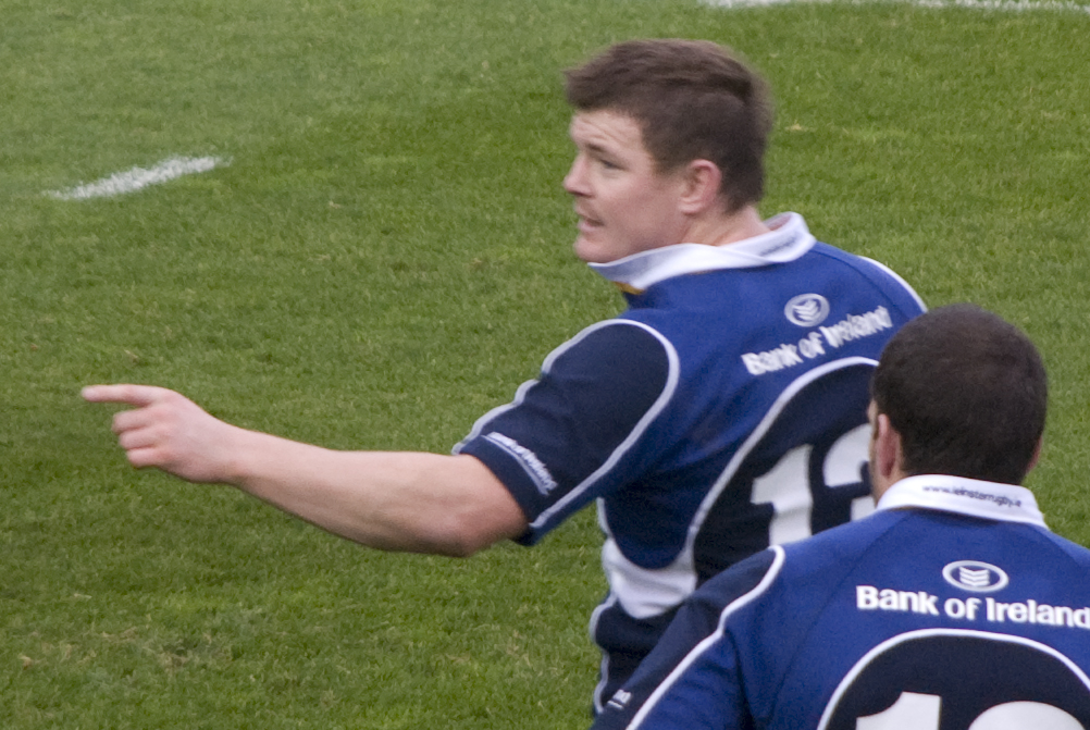 Brian O'Driscoll. Prise le 10 novembre 2007. Leinter Rugby v Leicester Tigers in Heineken Cup.